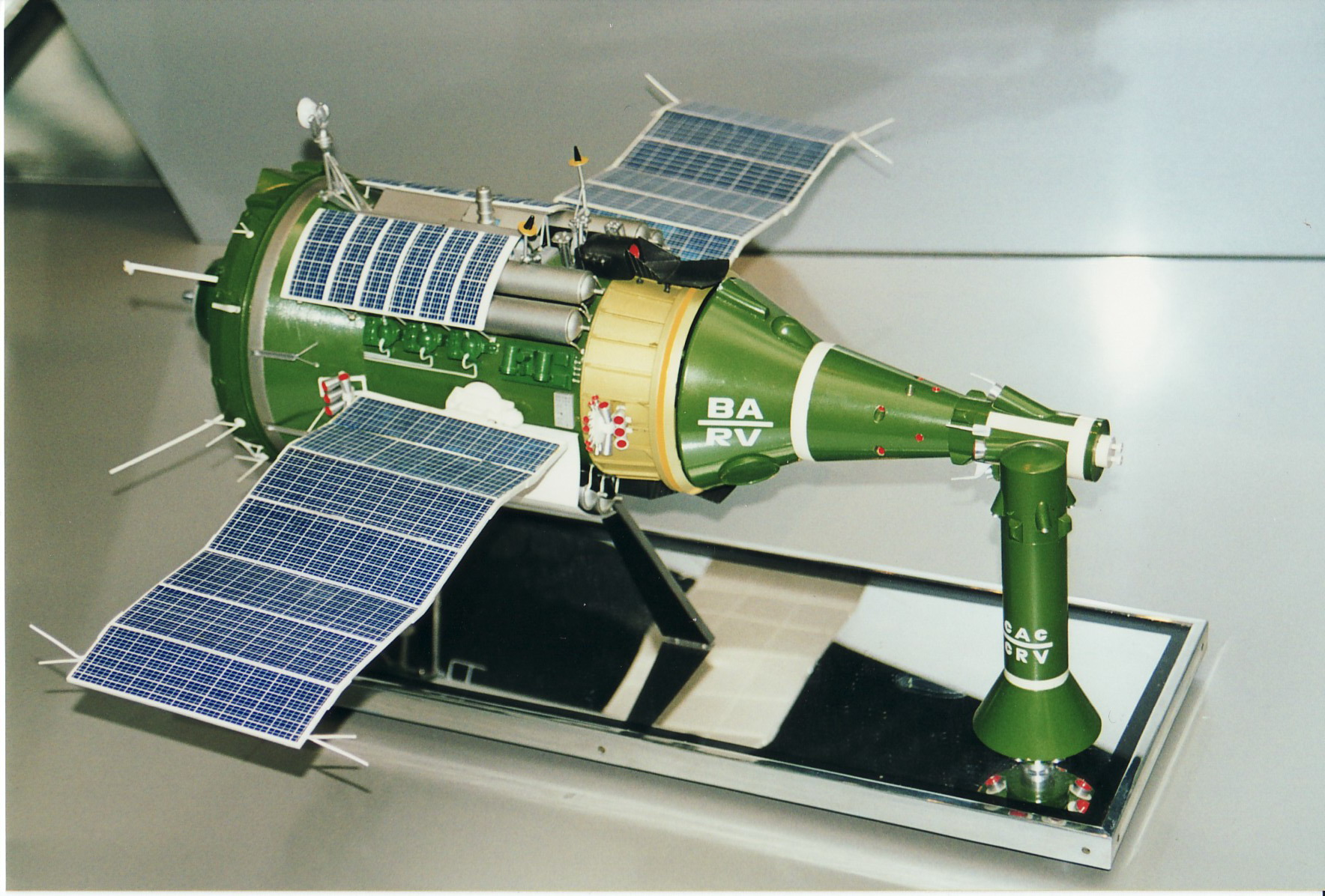 Modell des TKS - Raumschiffes auf der ILA - 2000 in Berlin